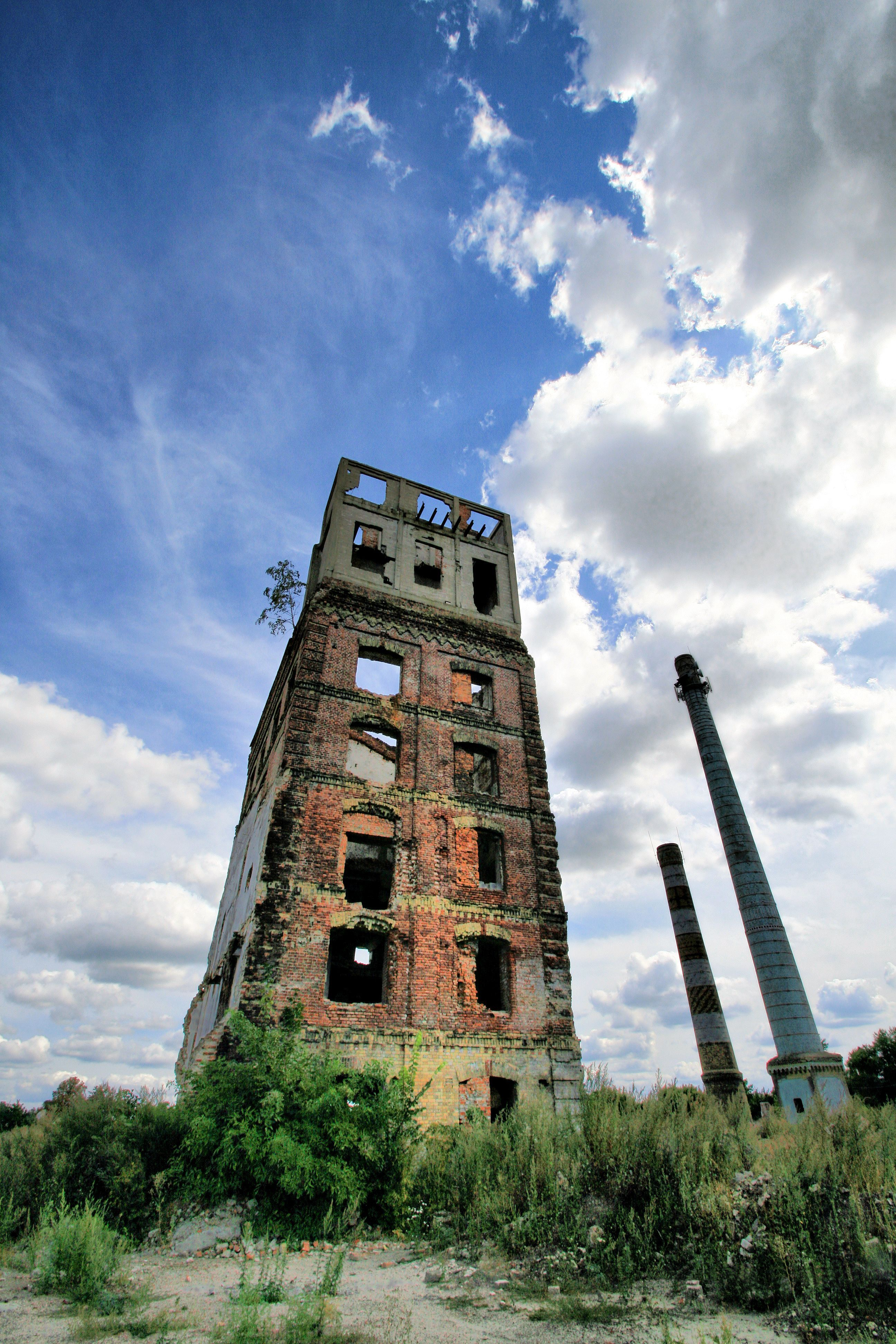 Цукровий завод № 17 Товариства Курських цукрових і рафінадних заводів, Буринський район, м. Буринь, вул. Садова (або Свободи), 4, 5